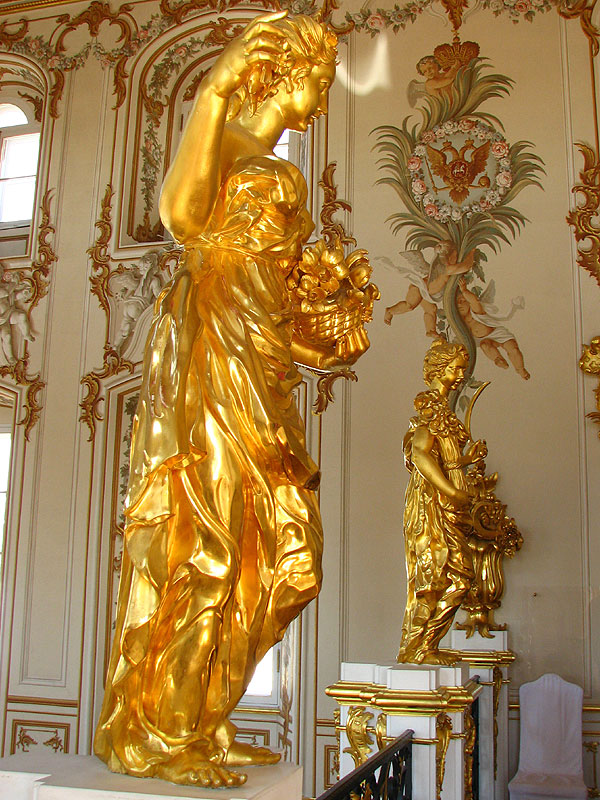 Интерьер Большого Петергофского дворца. Пардная лестница. Аллегория Весны.